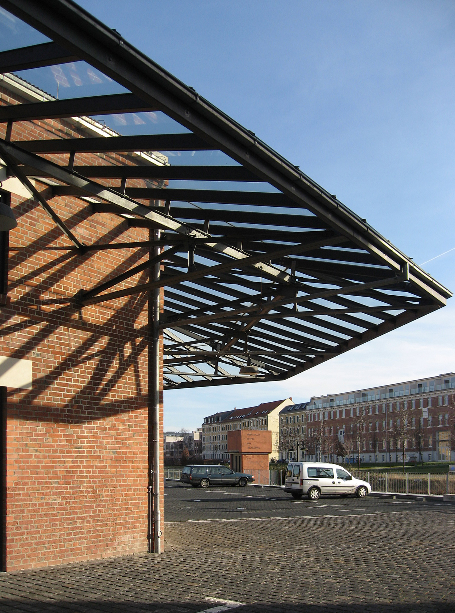 Stelzenhaus in Leipzig-Plagwitz, im Hof